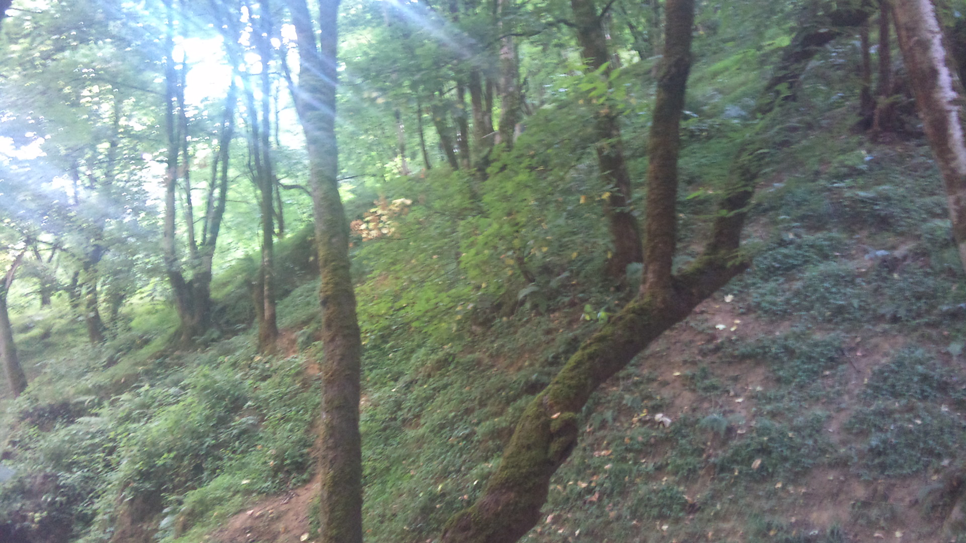 جنگل گیلان